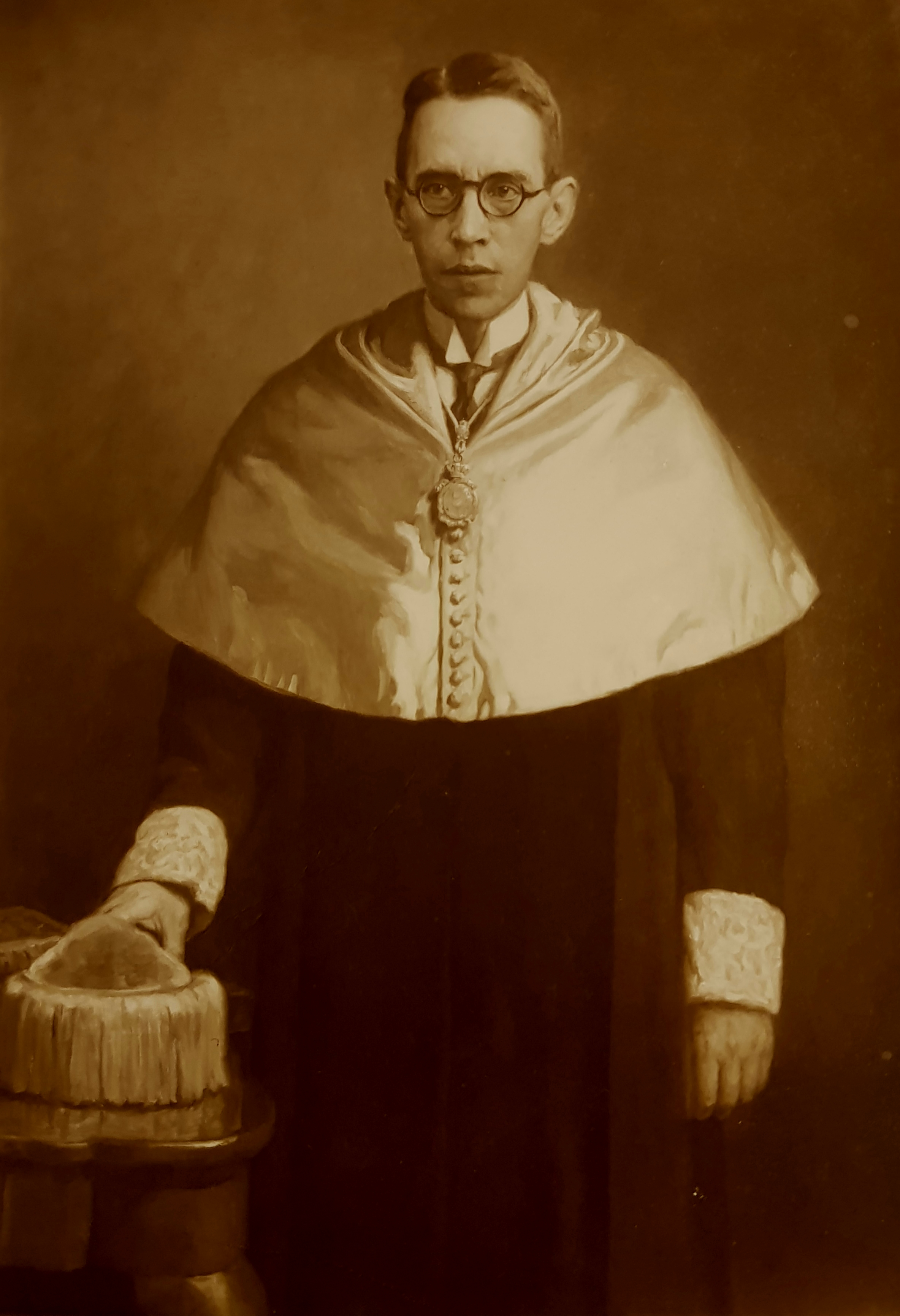 Pintura al oli de Francesc Ferrer i Solervicens amb la Toga de Catedrátic de Medicina